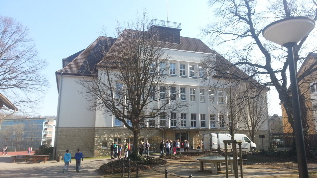 Das Werner-von-Siemens-Gymnasium in Bad Harzburg; aufgenommen während der Sonnenfinsternis vom 20. März 2015